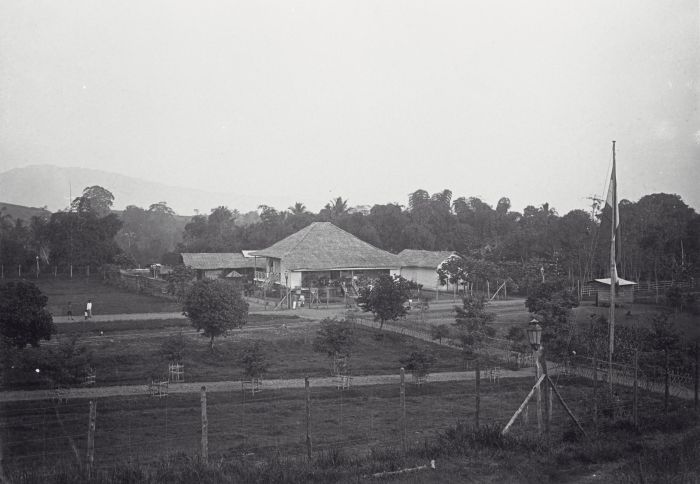 foto. Het huis van Hendrik Colijn te Seulimeum, Atjeh